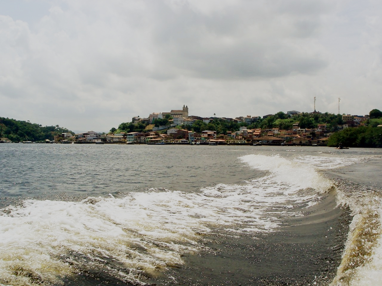 Camamu, Maraú, Bahia